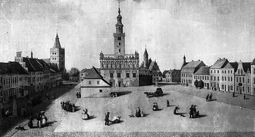 CHEŁMNO. Widok rynku i ratusza od strony wschodniej wg planu A. Schäffera z połowy XIX w. Litografia 22x41 cm, zdublowana na kart. 31x49 cm. Opublikowano w: Dzieje Chełmna, Warszawa 1987